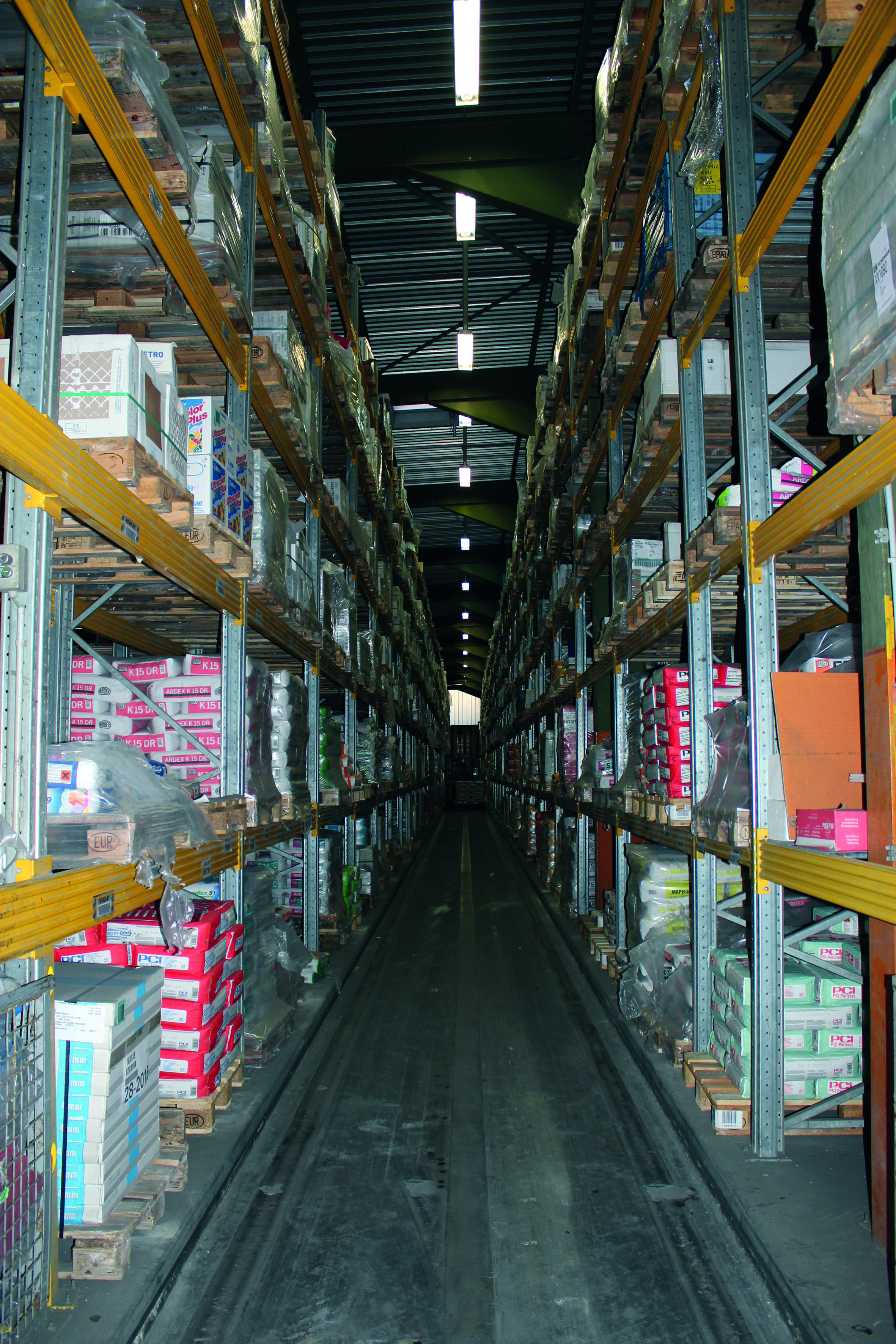 Gang im Hochregallager des Logistikzentrums der Heinrich Taxis GmbH + Co. KG in Ilsfeld